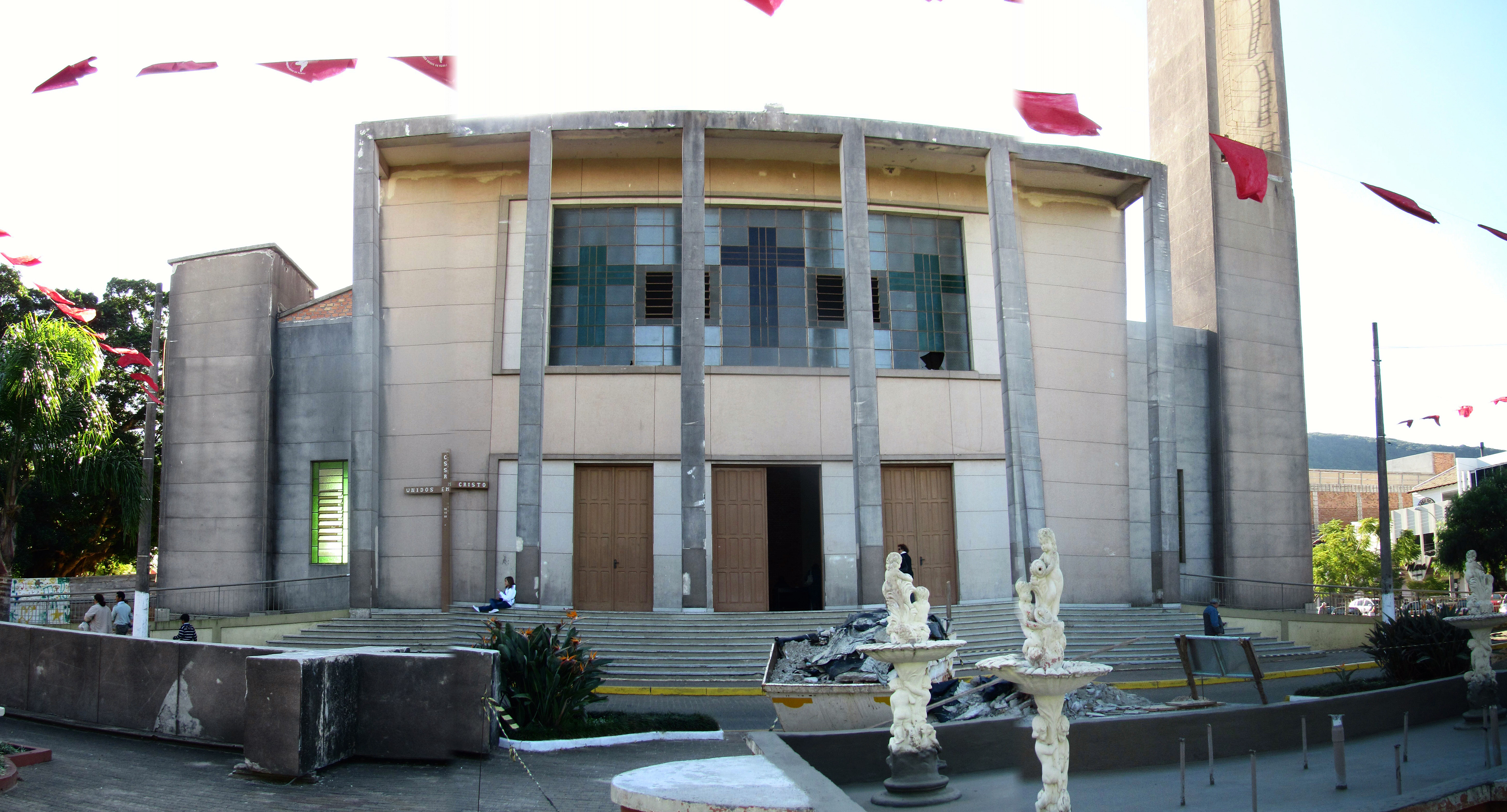 Igreja Matriz de Osório